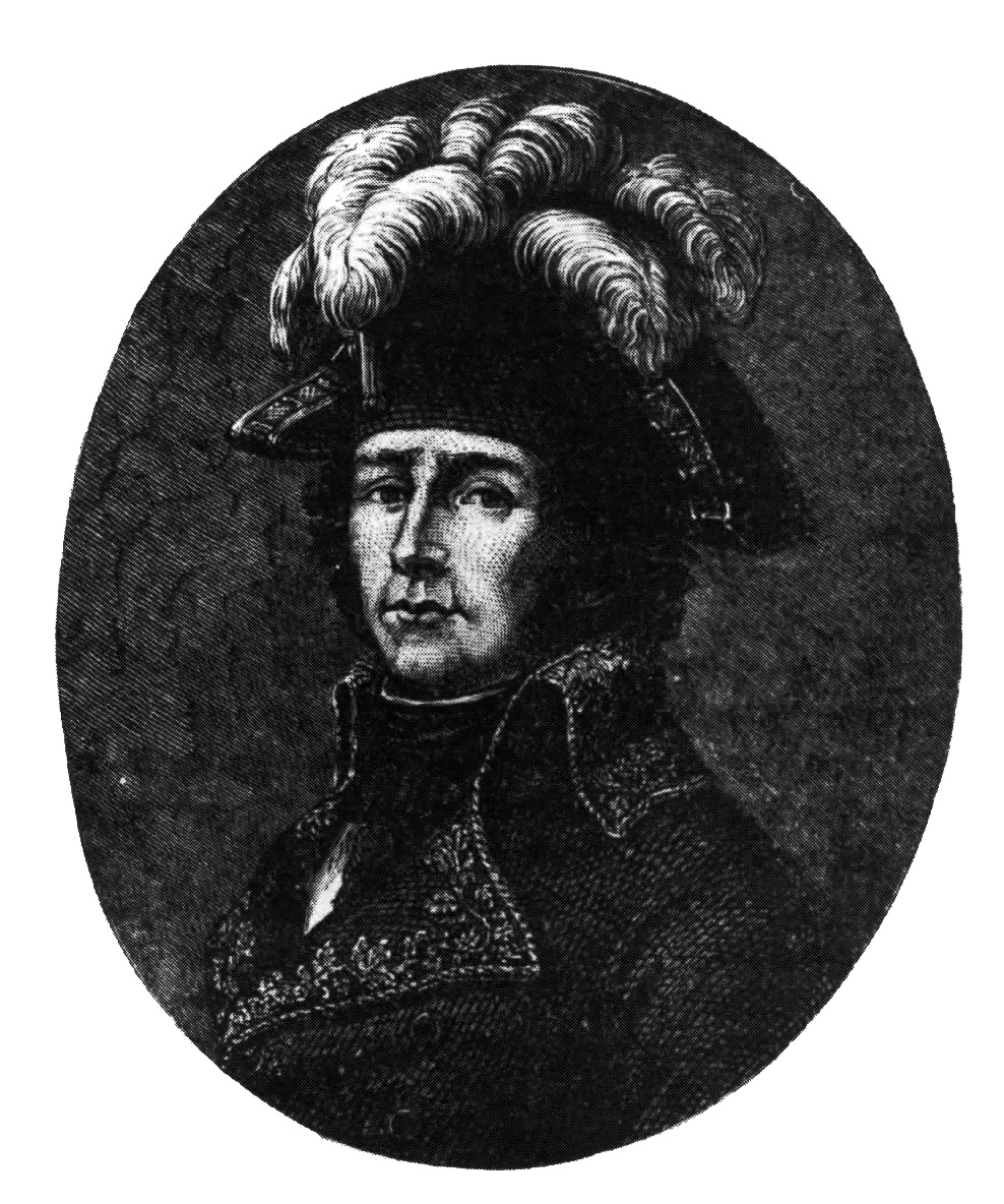 Général Rossignol (1759-1802)